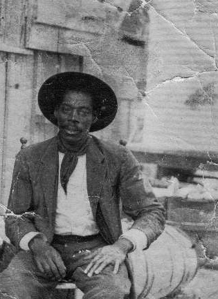 William James, contratista jamaiquino de la United Fruit Company en Morales, Izabal.